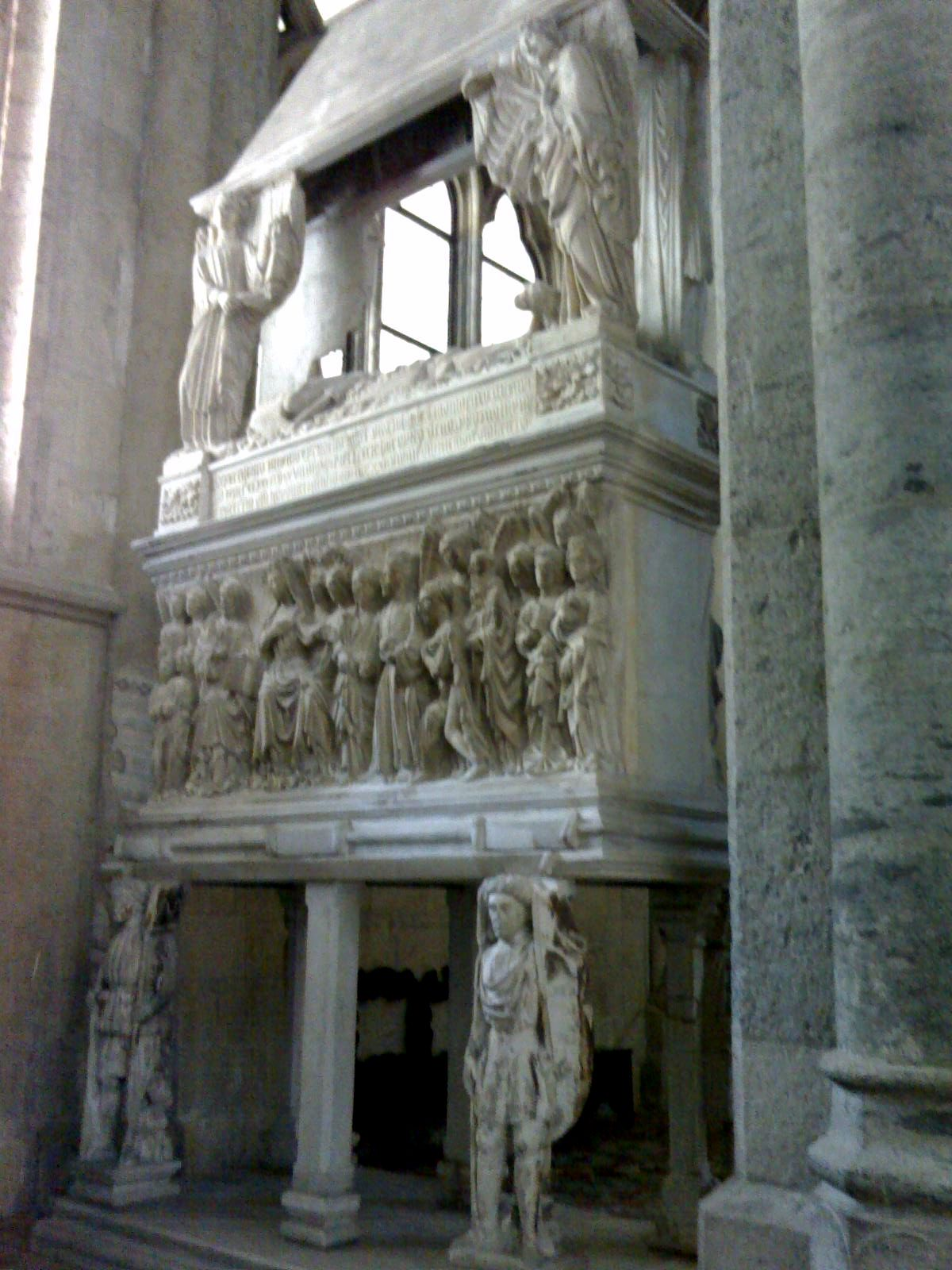 Antonio Baboccio da Piperno - Sepolcro di Ludovico Aldomorisco (1421 ca., Basilica di San Lorenzo Maggiore, Napoli)